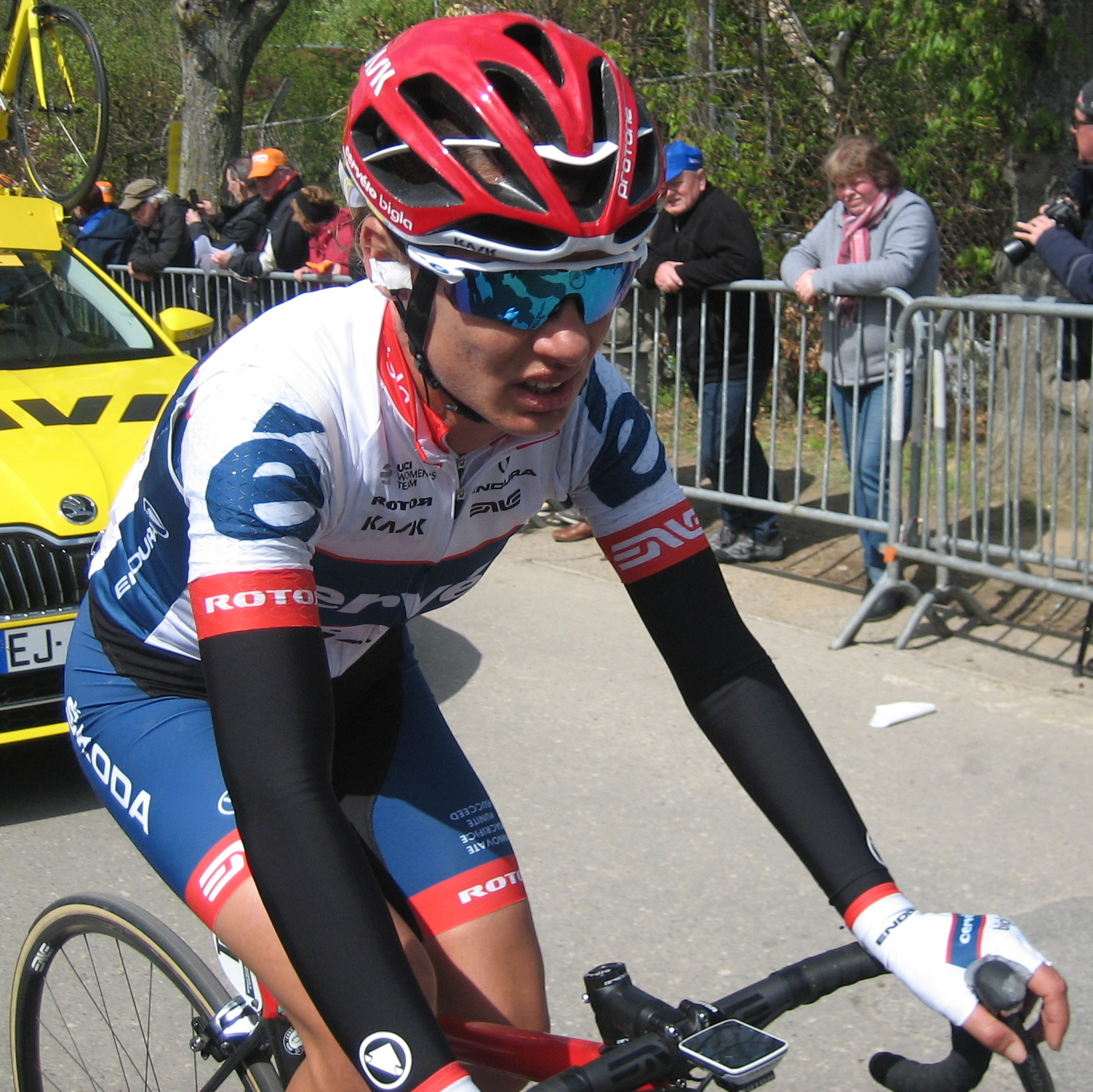 Finish van de Waalse Pijl 2017 in Huy.